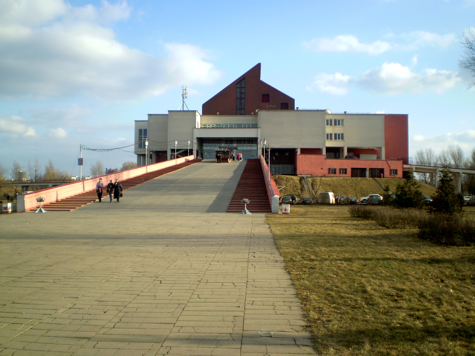 Цэнтр маладзёжнай творчасці